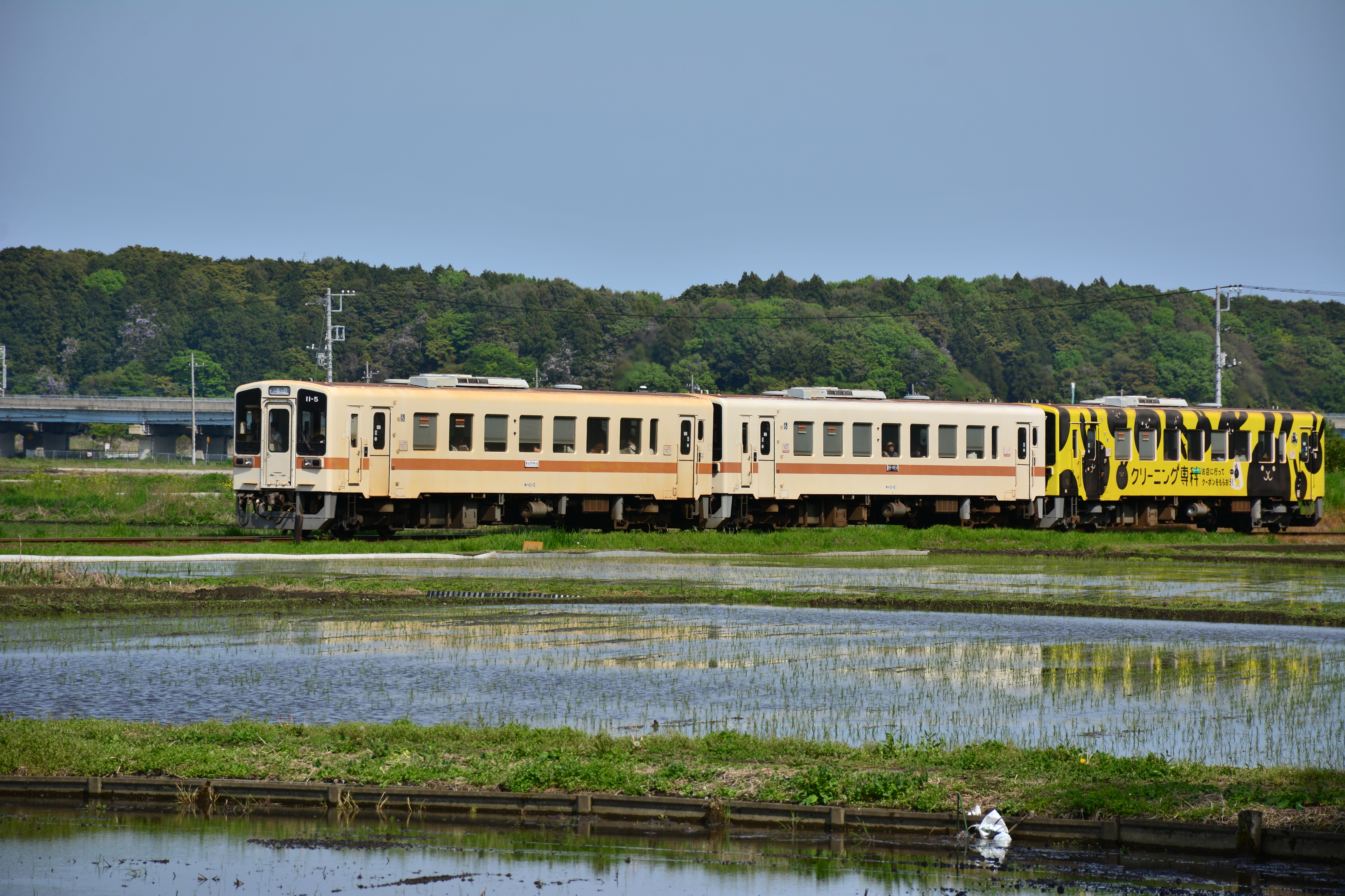 水田を走ったローカル線：多客期の三両運転